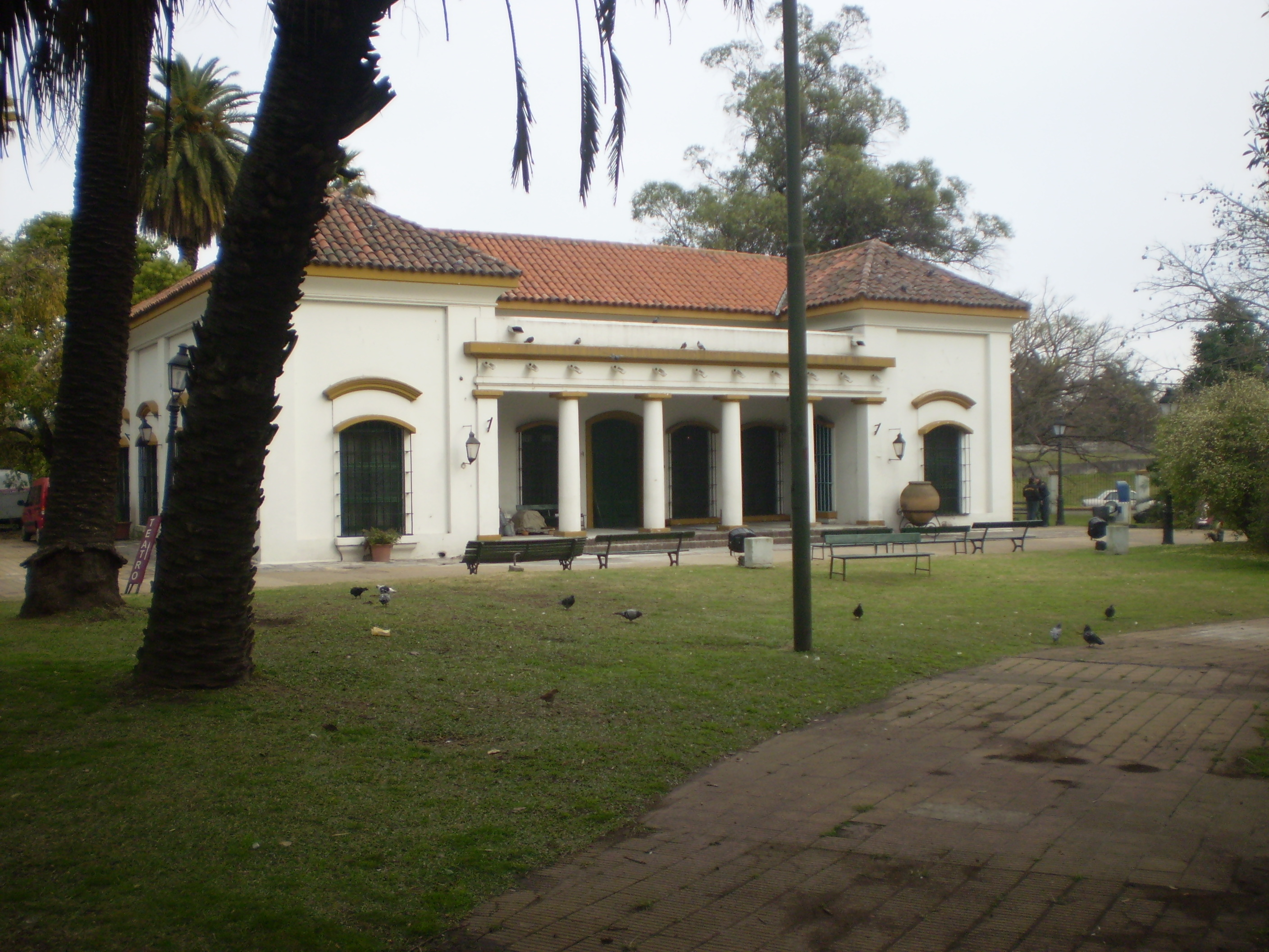 Fachada del Museo Histórico de Buenos Aires, Cornelio de Saavedra.